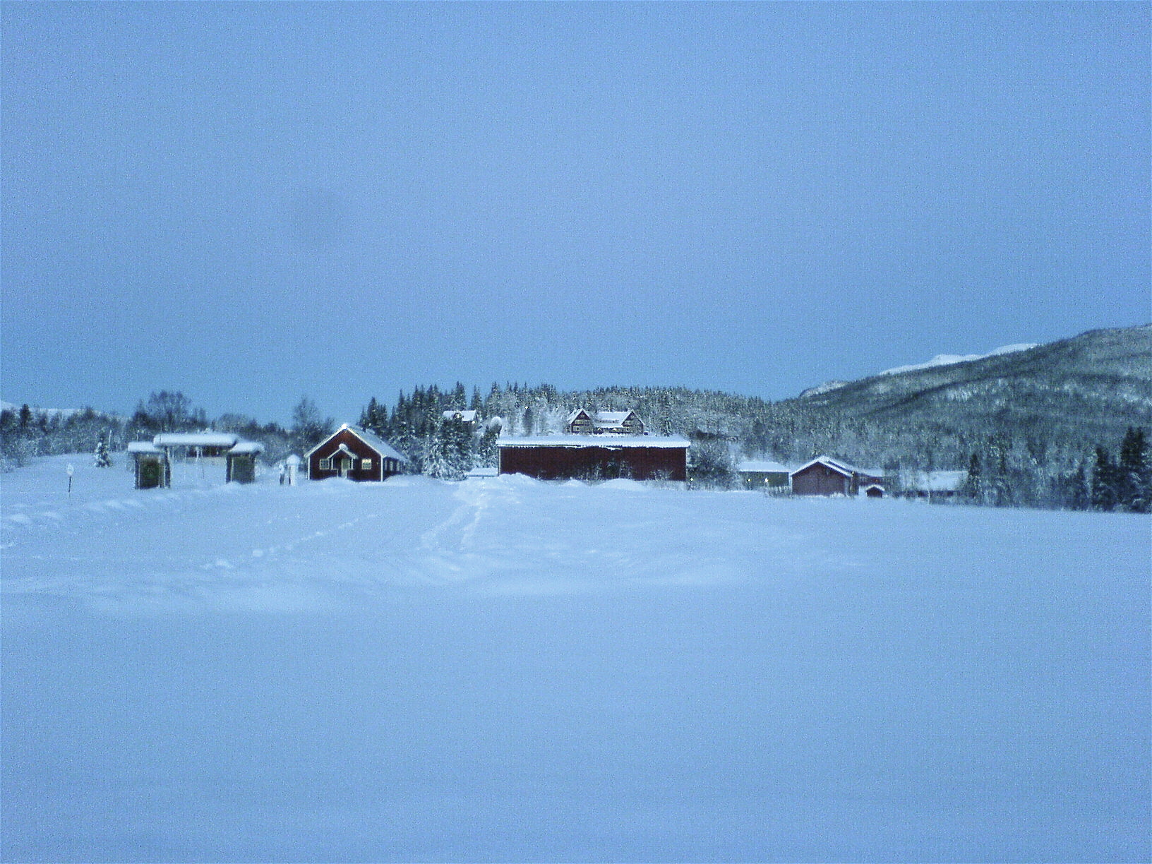 Drevjmoen HV-leir. Bildet er tatt av meg selv,H. Dahlmo 00:31, 16 January 2006 (UTC)